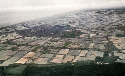 Westland De Glazen Stad: omgeving van 's-Gravenzande en Heenweg met op de voorgrond het Staelduijnse Bos